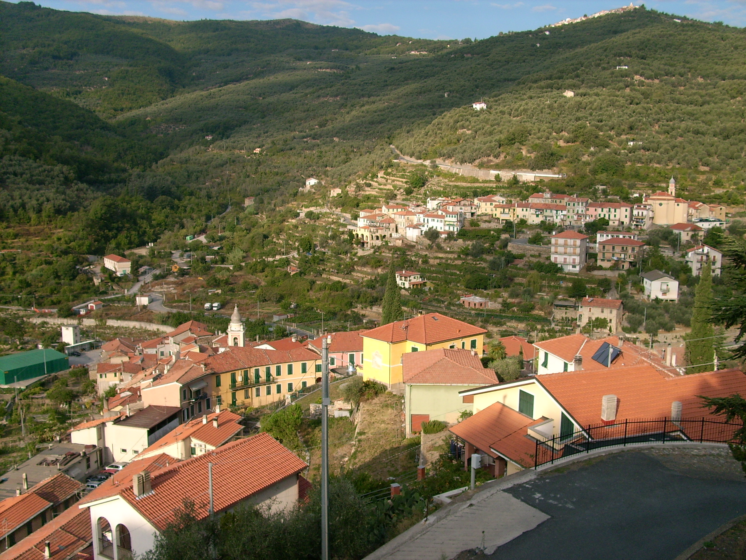 Panorama di Chiusavecchia, Liguria, Italia